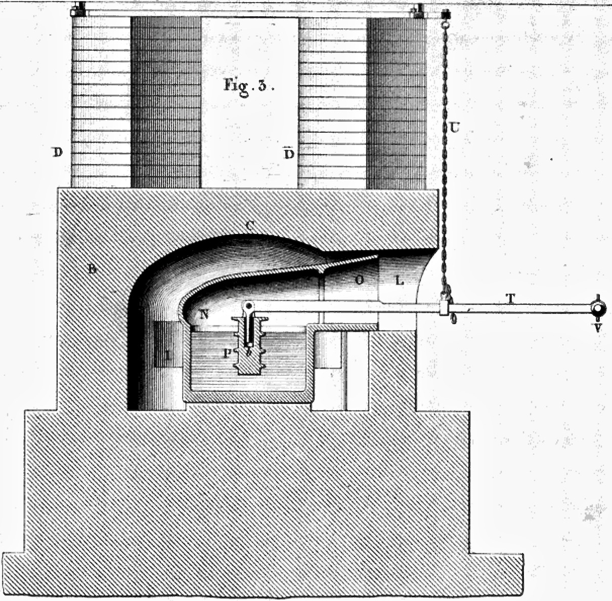 Henri Guinand (1771–1851): Ofen zum Schmelzen optischen Glases. P = von seinem Vater Pierre-Louis Guinand (1748–1824) erfundener und vom Autor veränderter Rührkolben ("guinand") zur Vermeidung von Schlieren und Blasen. Description du procédé de fabrication du flint-glass; par M. Guinand, rue Mouffetard, 283. In: Bulletin de la Société d’encouragement pour l’industrie nationale (Paris) 39/1840, S. 468–472, hier: S. 468/Fig. 3.